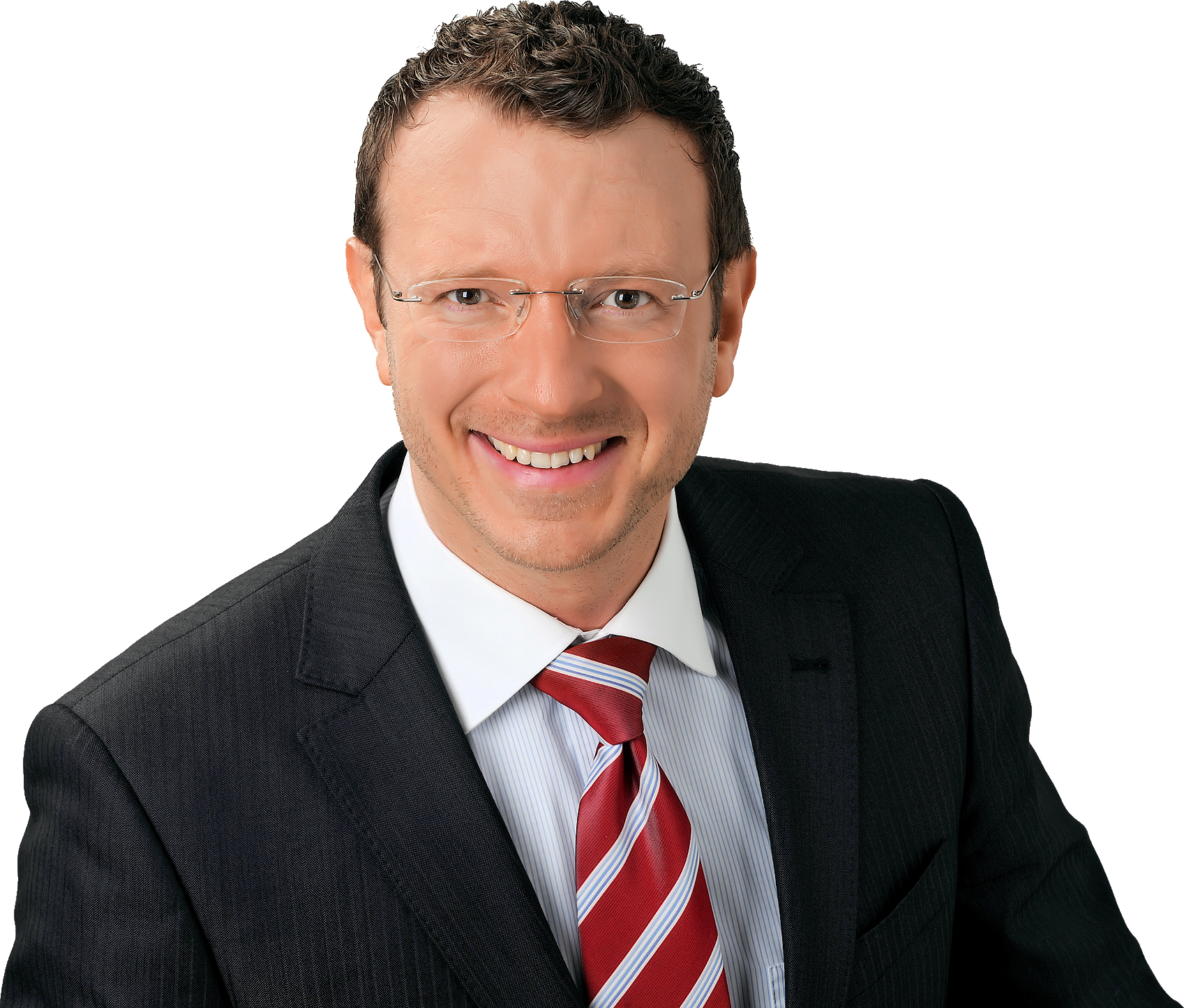 Portrait von Dr. Jan-Marco Luczak, MdB (2012).